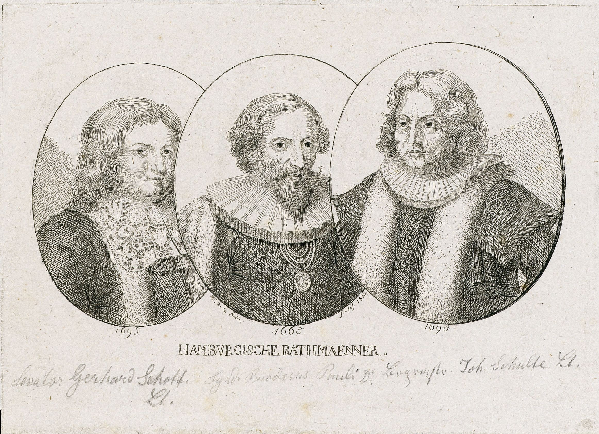 Hamburgische Rathmaenner